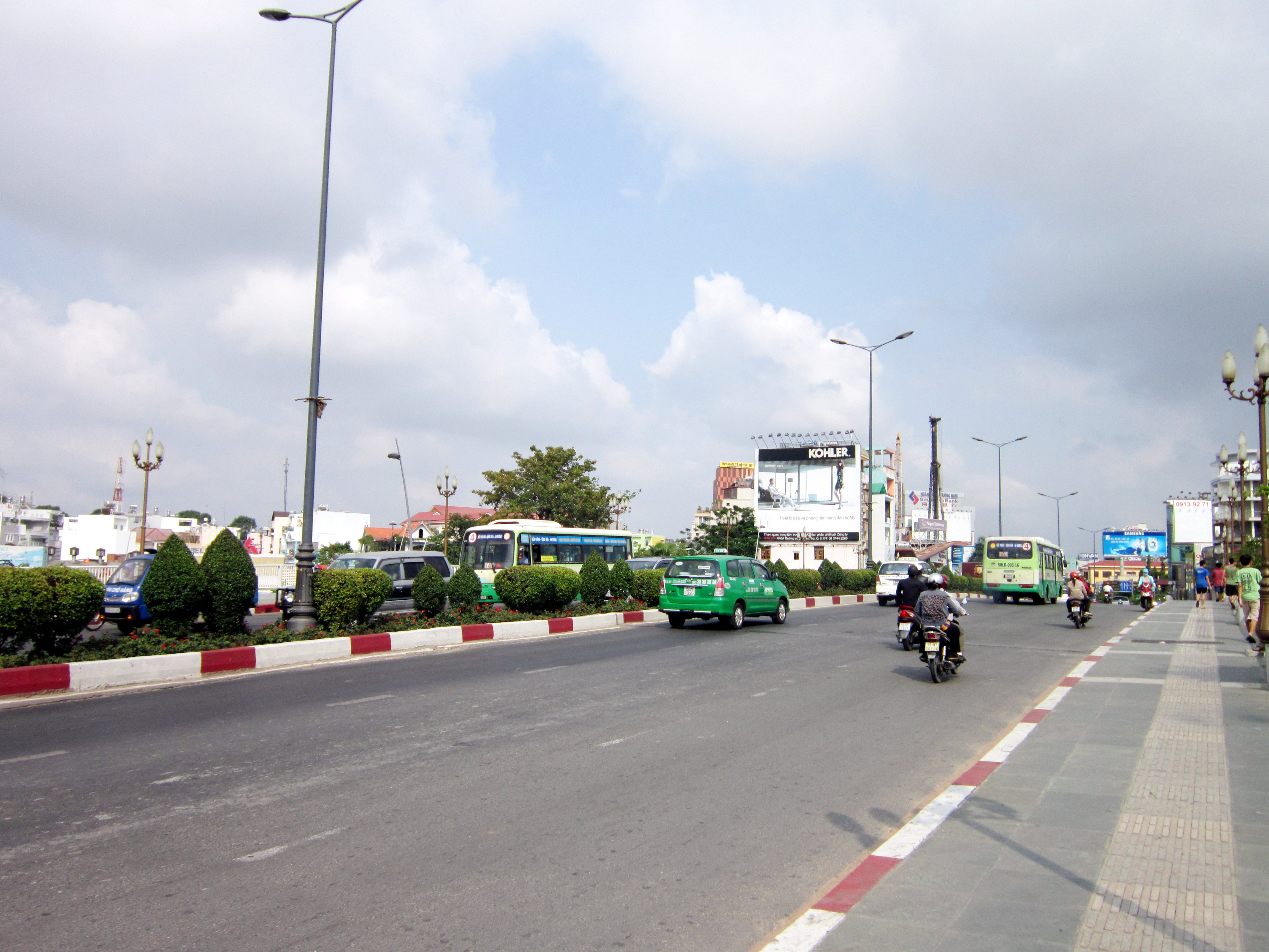 Cầu Công Lý hiện nay trên đường Nam Kỳ Khởi Nghĩa, thuộc quận 3, Thành phố Hồ Chí Minh, Việt Nam.